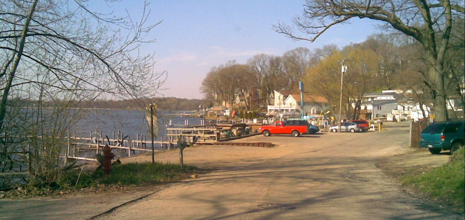 FoxLake